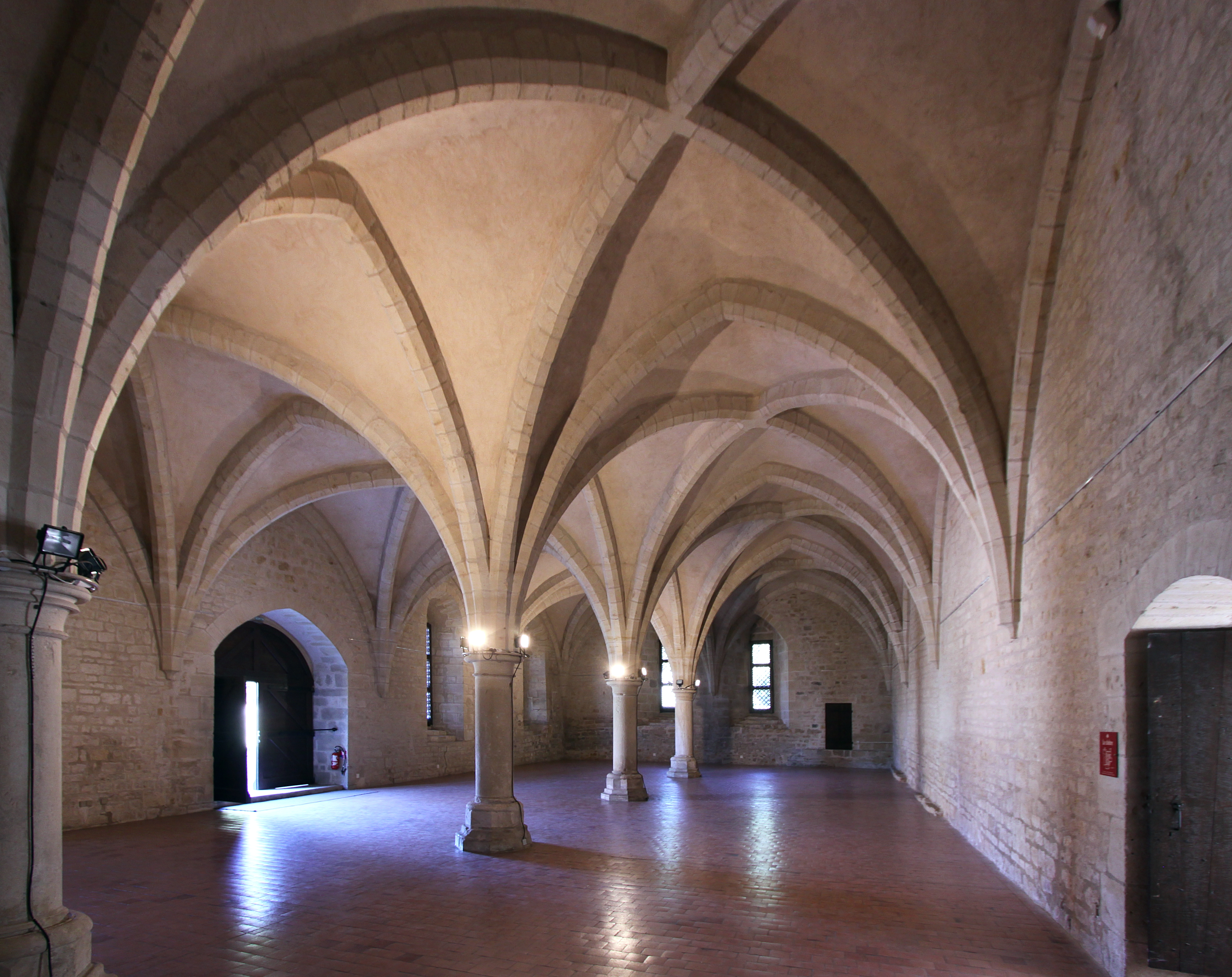 Zisterzienserklosters Noirlac im französischen Département Cher - Keller